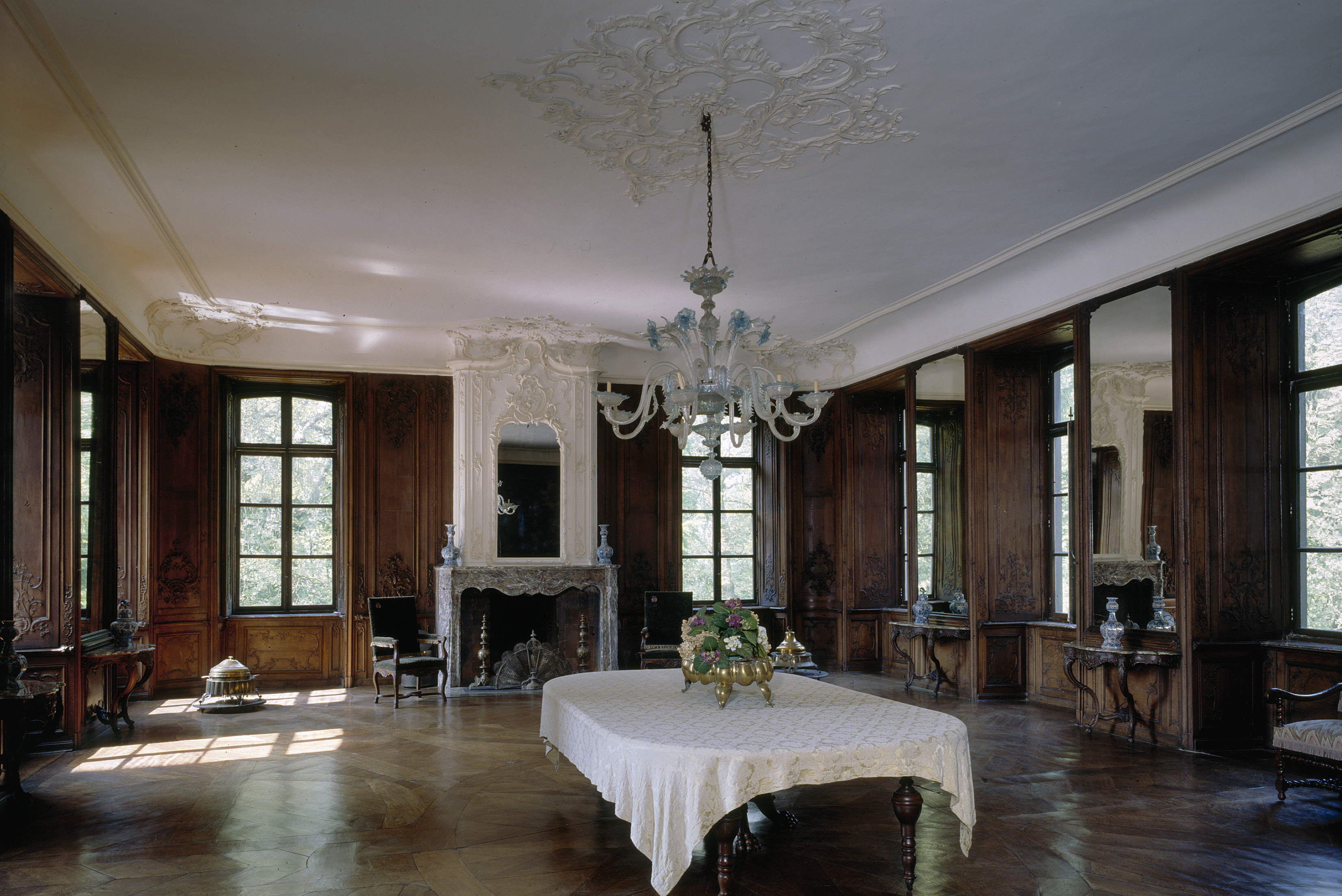 Kasteel Hillenraad: Interieur eetzaal (opmerking: Gefotografeerd voor Wonen in Arcadië)